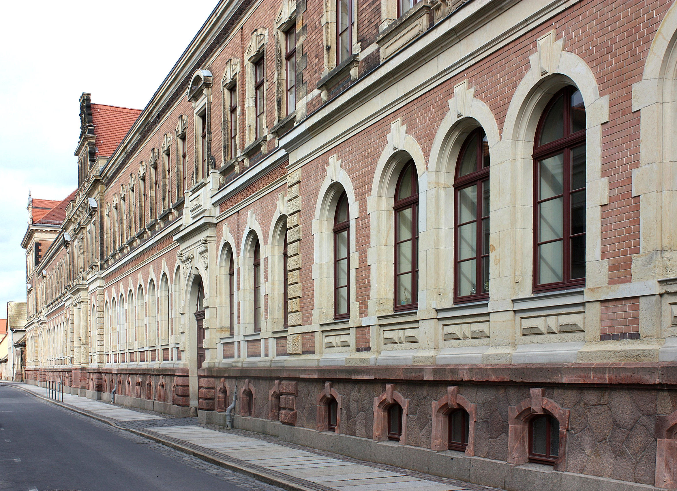 Grimma, Klosterstraße 1, der Neorenaissancebau des Gymnasiums St.Augustin, mehrfach umgebaut und erweitert